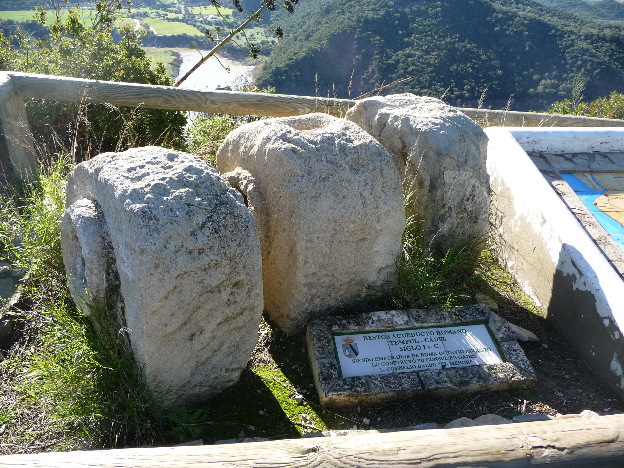 TajoDelAguila-P1060319.JPG